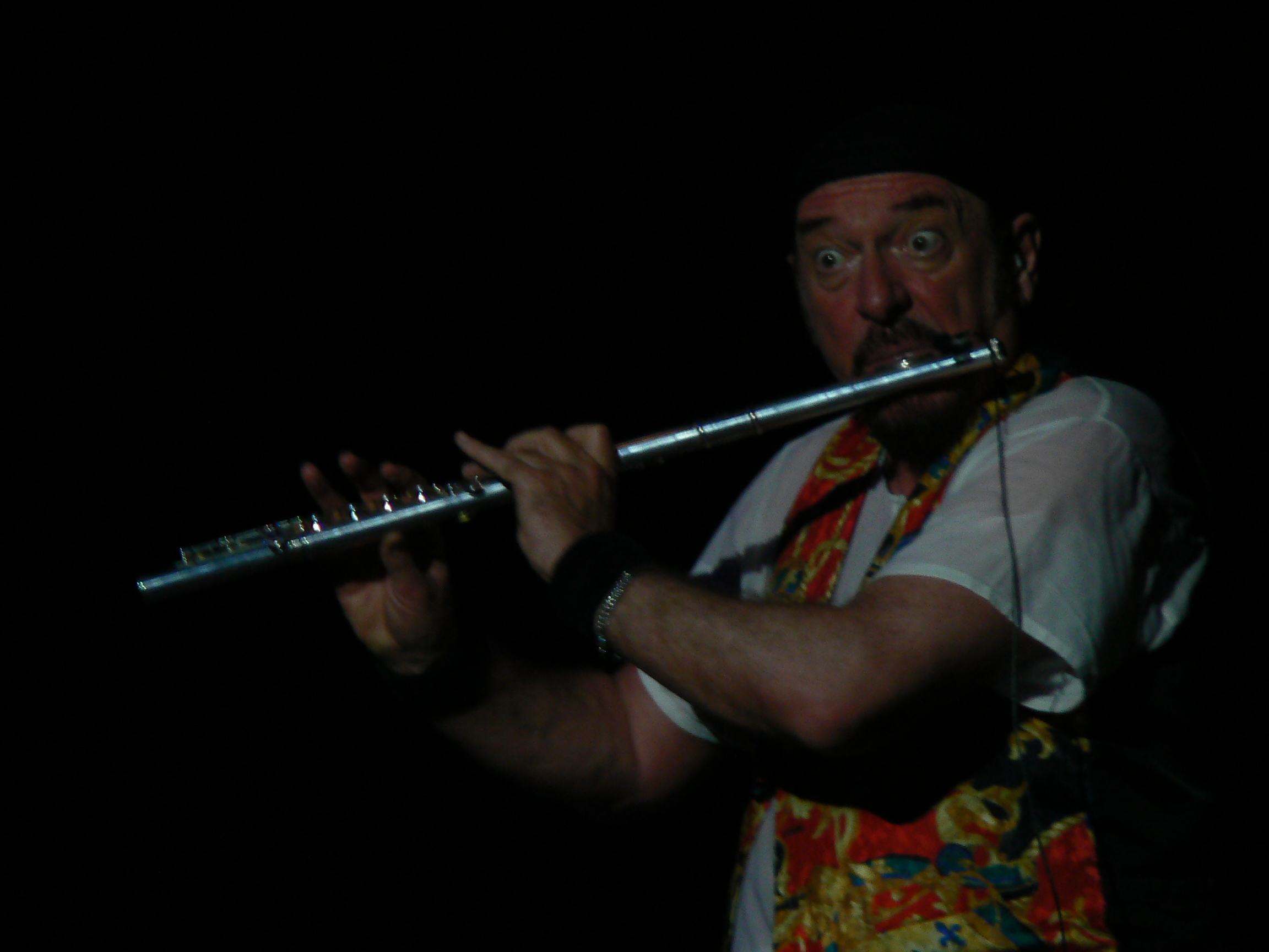 Ian Anderson (Jethro Tull) en concert à Forest National (Bruxelles) en Belgique le 01 juin 2007